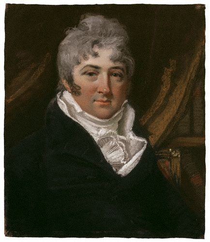 Porträt (c. 1803), Pastell, von Thomas Morton (1764–1838), gemalt von John Raphael Smith (1752–1812)